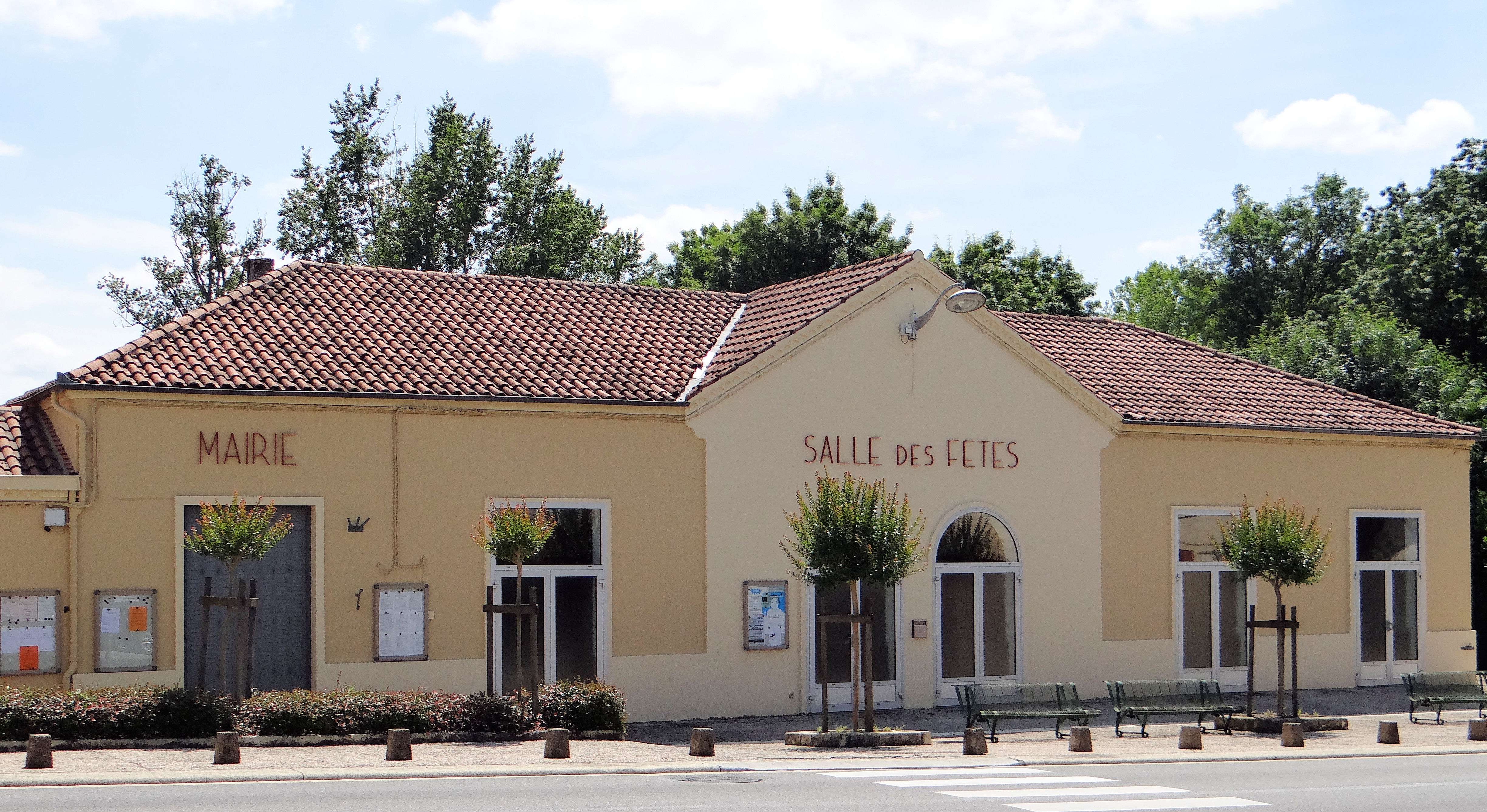 Dému - Mairie et salle des fêtes